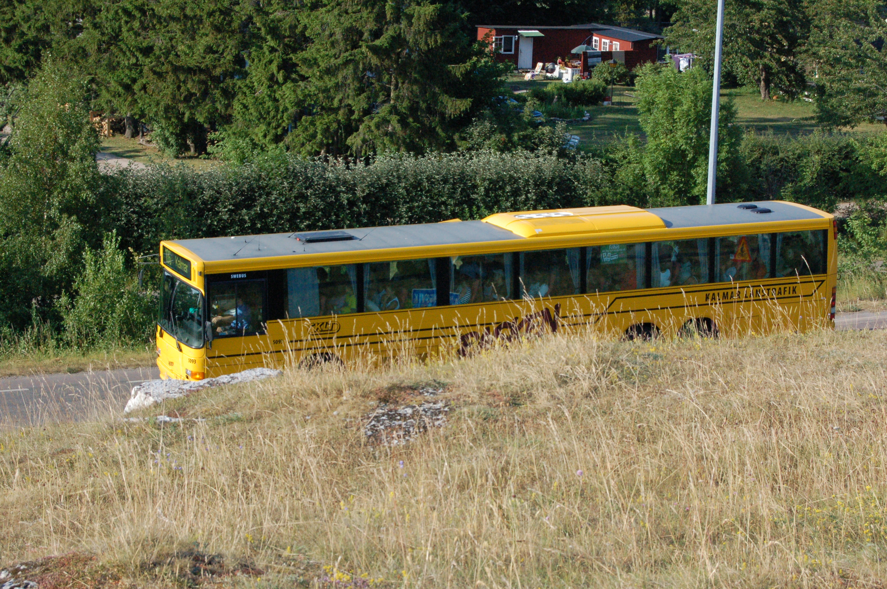 Bus from Kalmar Läns Trafik